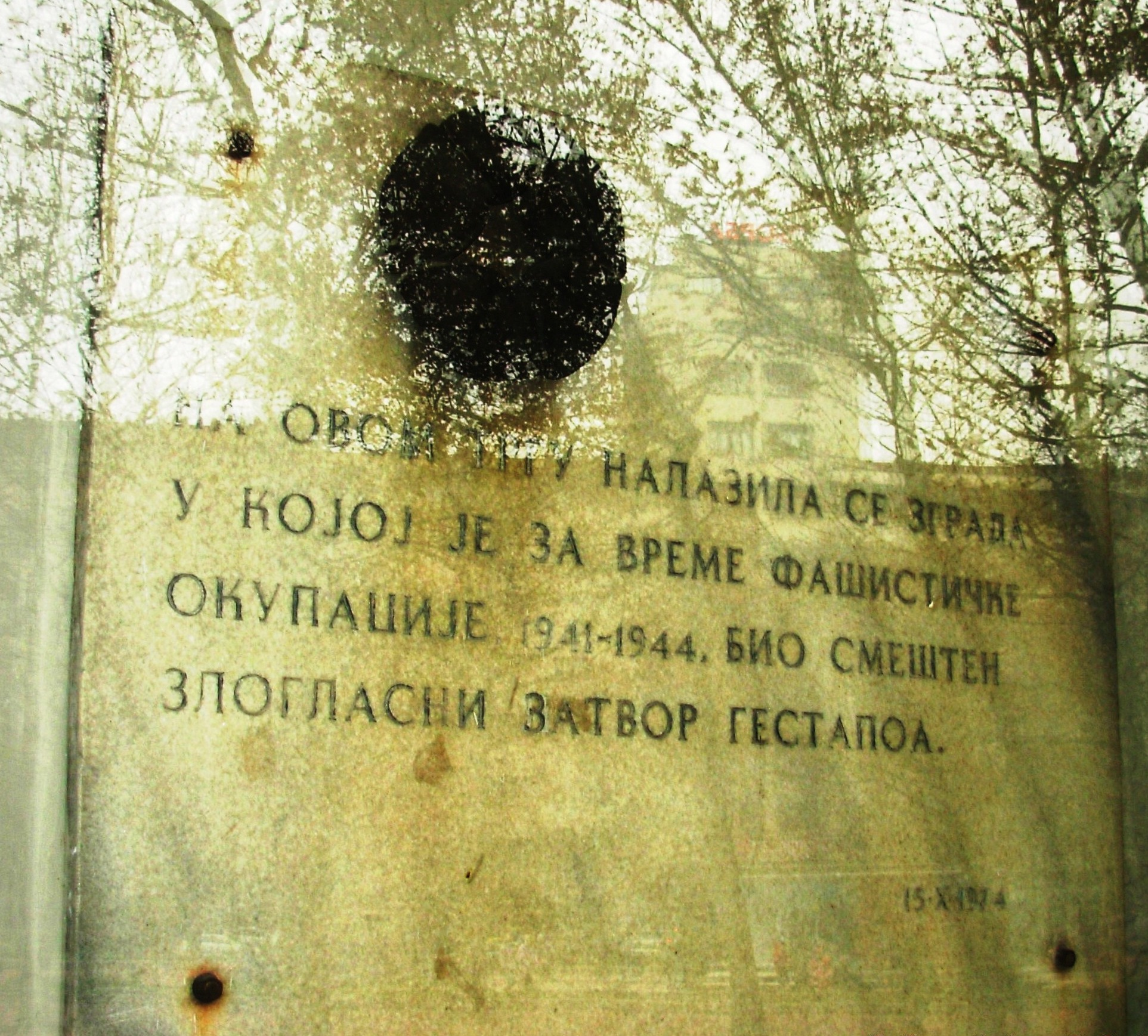 Tabla na trgu Nikole Pašića, Beograd. Uspomena na zatvor Gestapoa koji se tu nalazio 1941-1945. Slikao Goldfinger